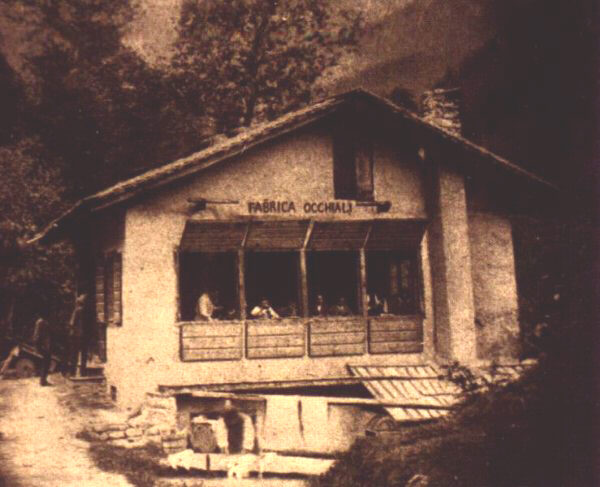 Laboratorio occhialeria Lozza. Esterni.